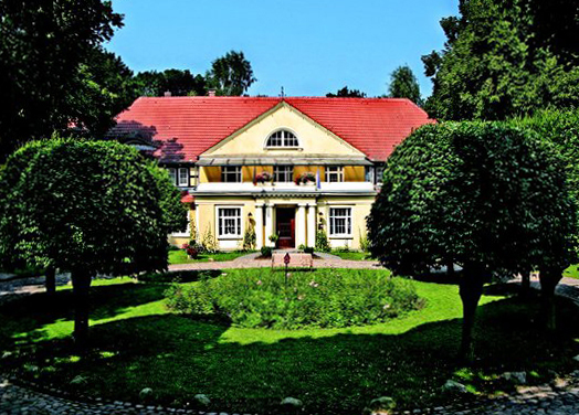 Das Gutshaus in Bömitz im Jahre 2009; heute Hotel